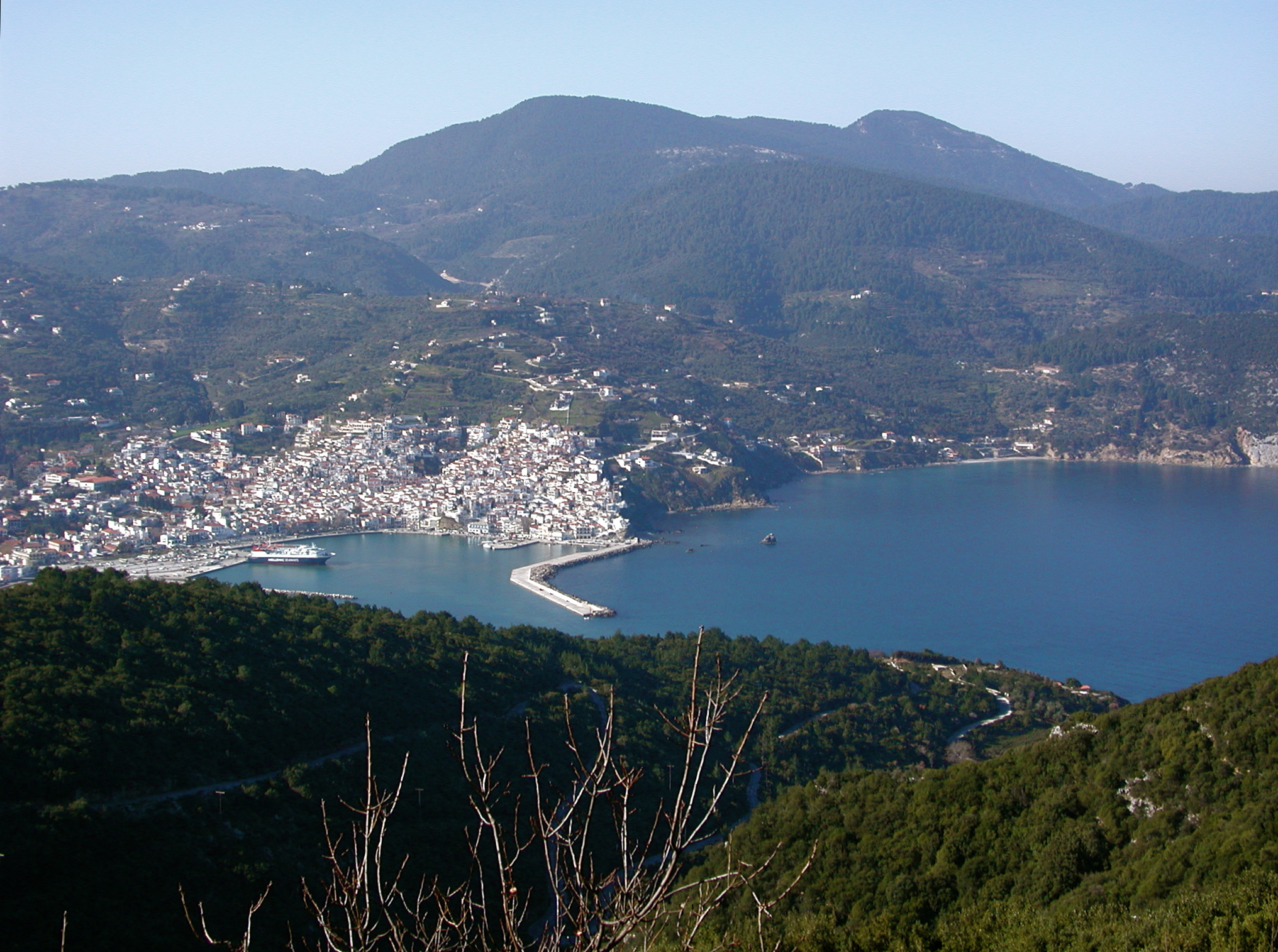 Photo by Skopelos-Slim